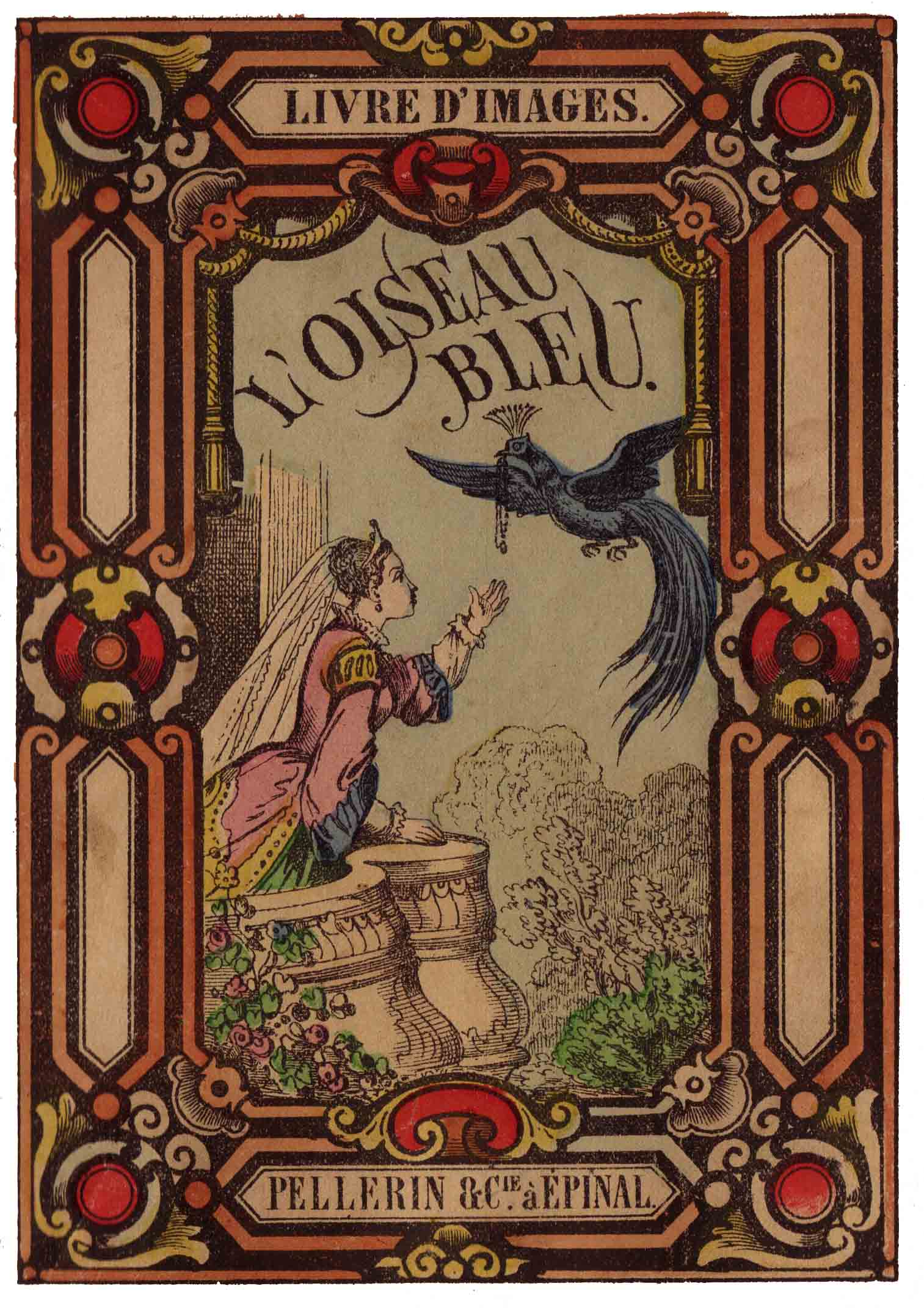 Images d'Épinal : L’Oiseau bleu